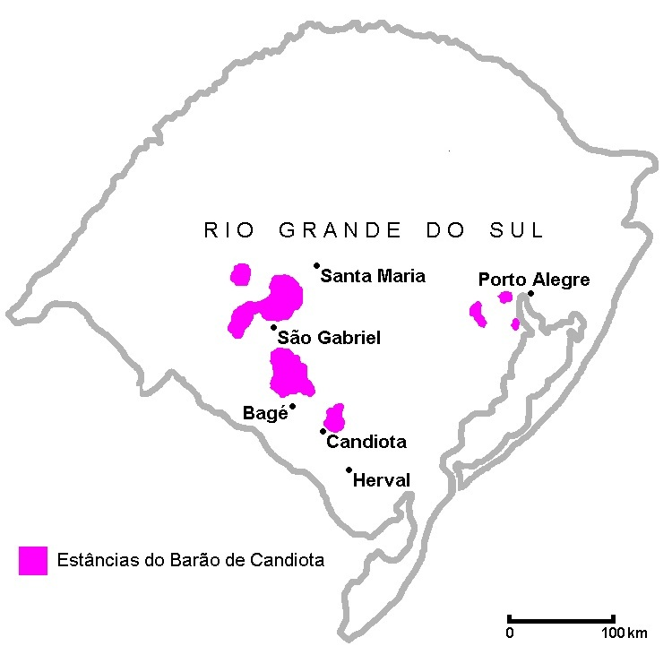 Extensão aproximada das propriedades rurais do Barão de Candiota (c.1875).